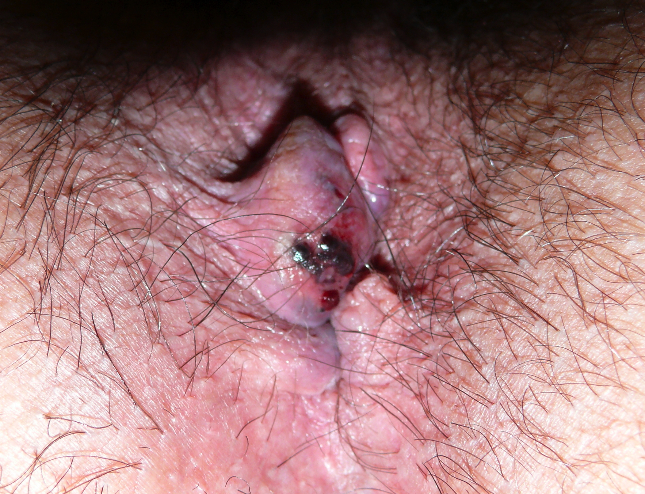 Geschwollene hervortretene Vene bei perianaler Thrombose mit blutiger Auflagerung bei 11 Uhr Steinschnittlage.